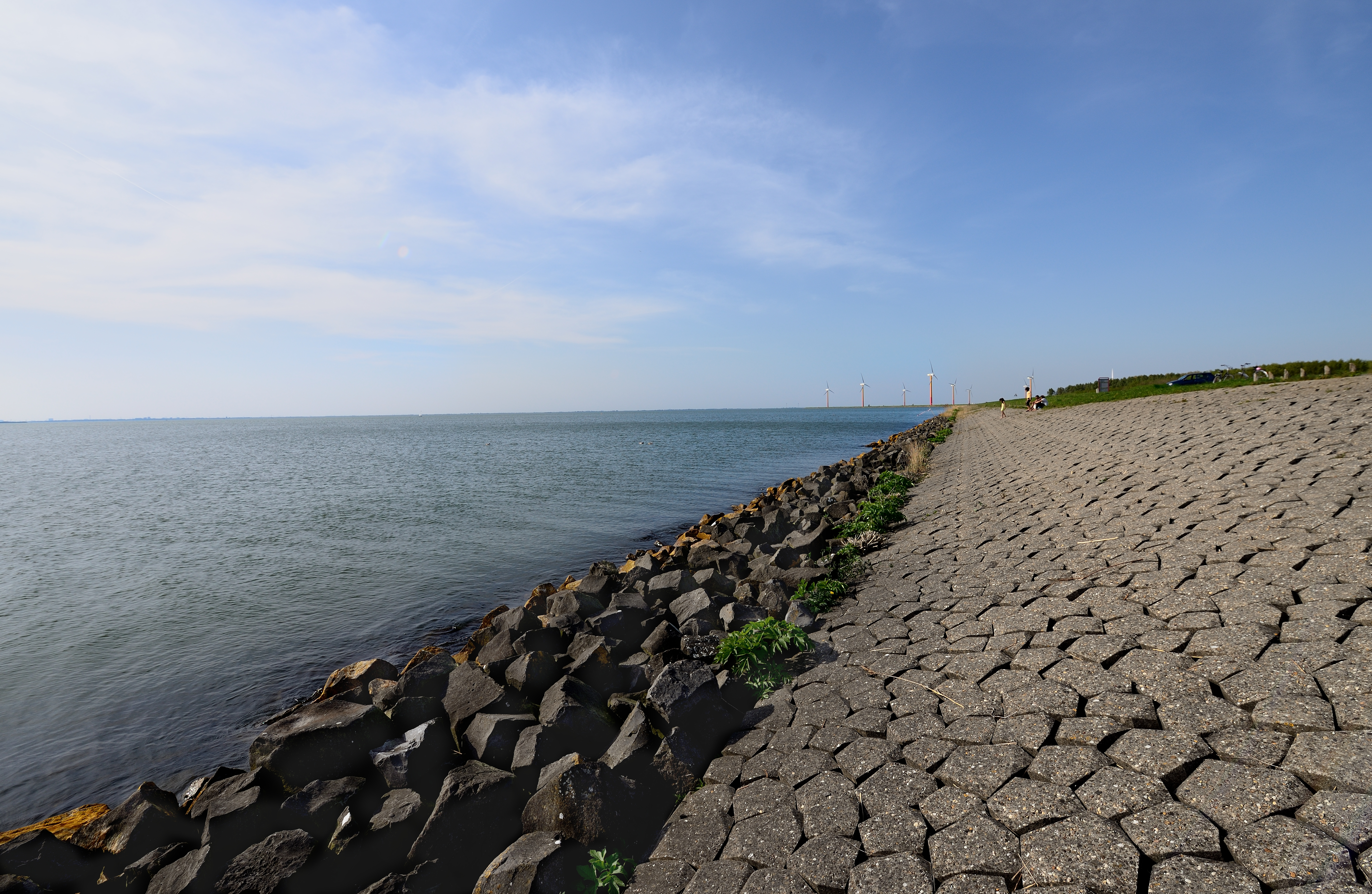 Нидерланды Almere Stad укрепление берегов вертикальными сваями